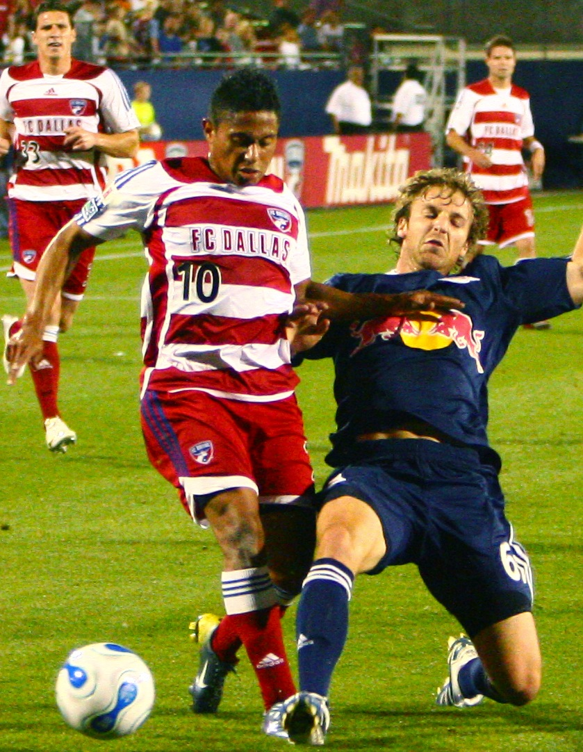 Ramón Núñez (#10) against Jeff Parke (#60)